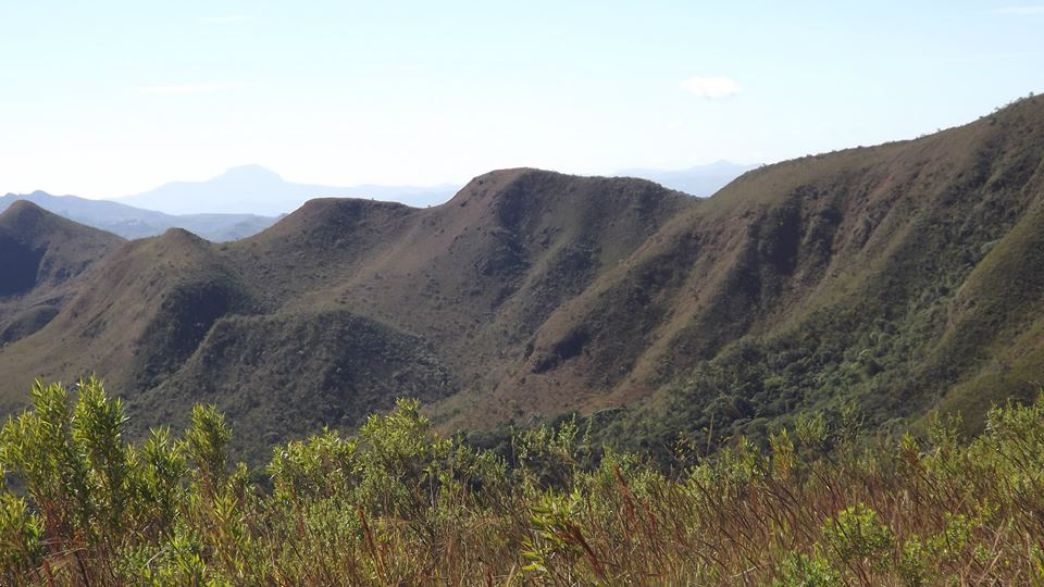 vista principal da serra do rola moça, próximo ao barreiro